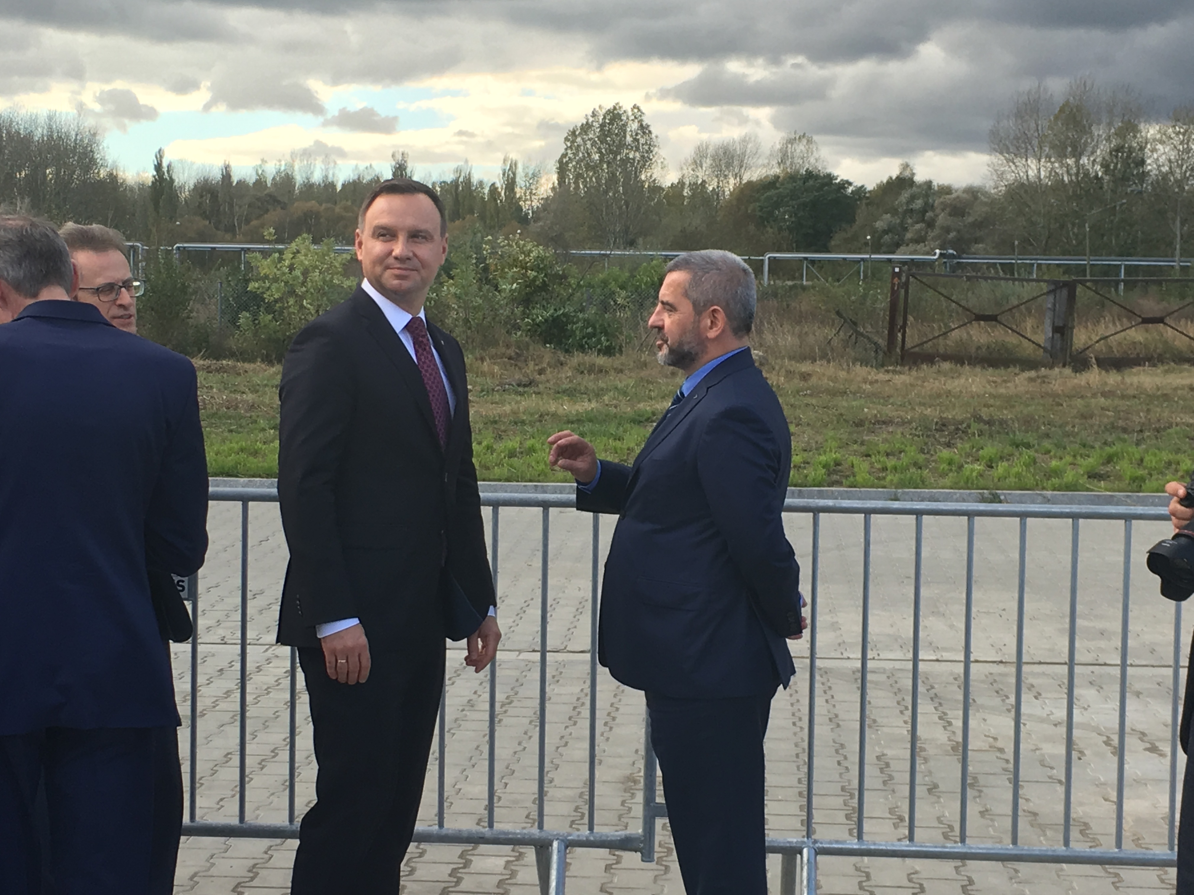 Uroczystość podpisania listu intencyjnego w sprawie zaangażowania kapitałowego Grupy Azoty S.A. w projekt PDH. W uroczystości podpisania listu intencyjnego udział wziął Prezydent Rzeczpospolitej Polskiej Pan Andrzej Duda.